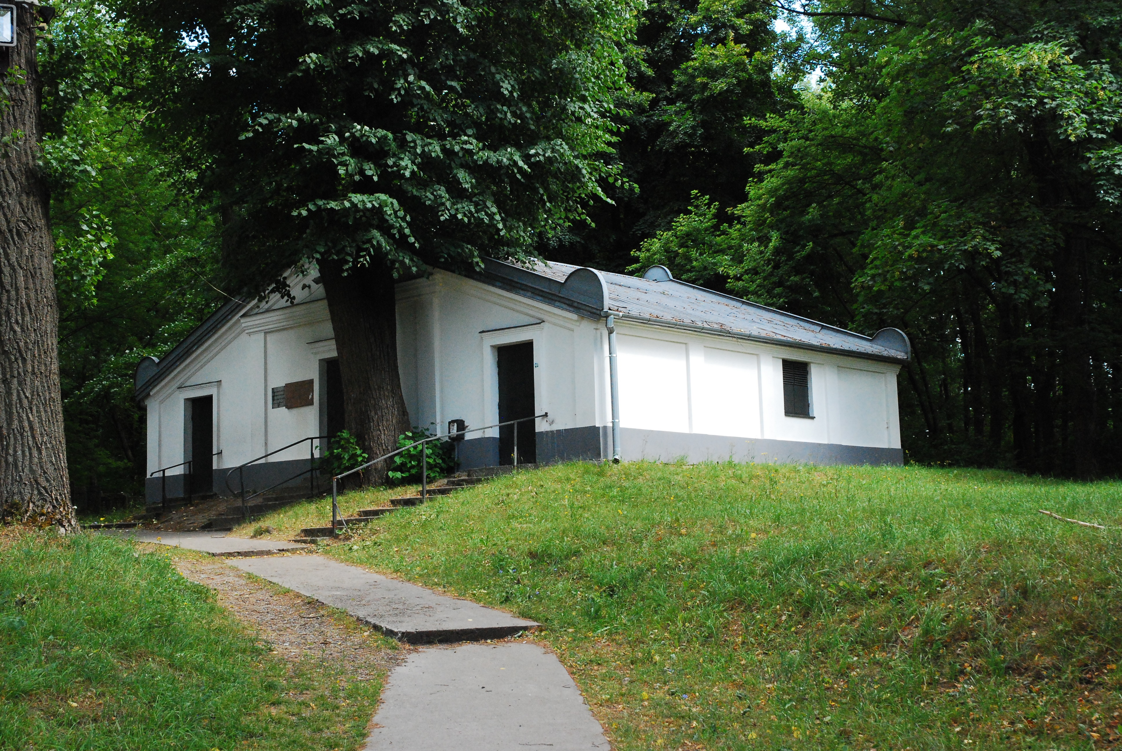 Kaplica nagrobna cadyka Elimelecha.